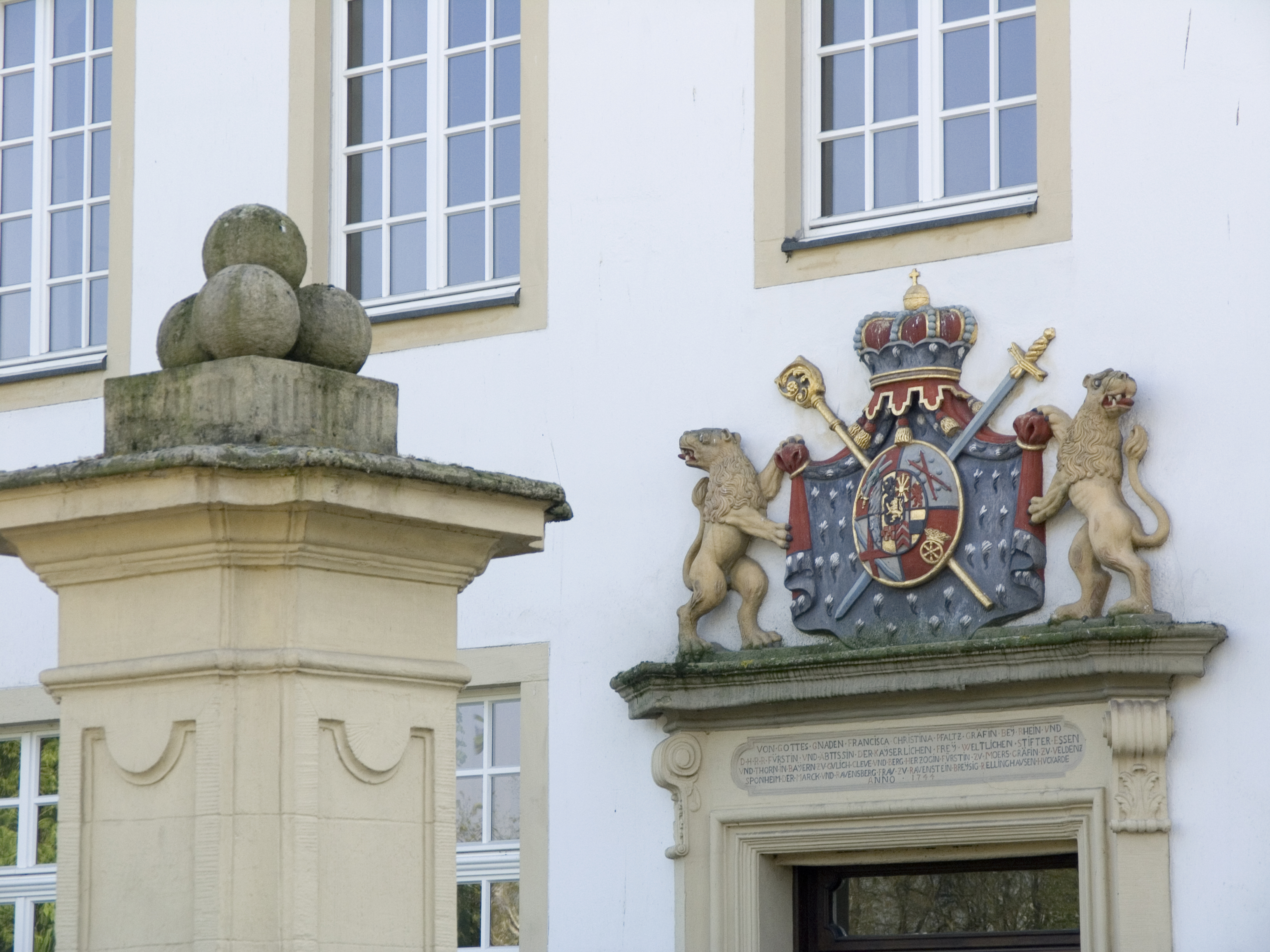 Северный Рейн - Вестфалия, Эссен - замок Борбек